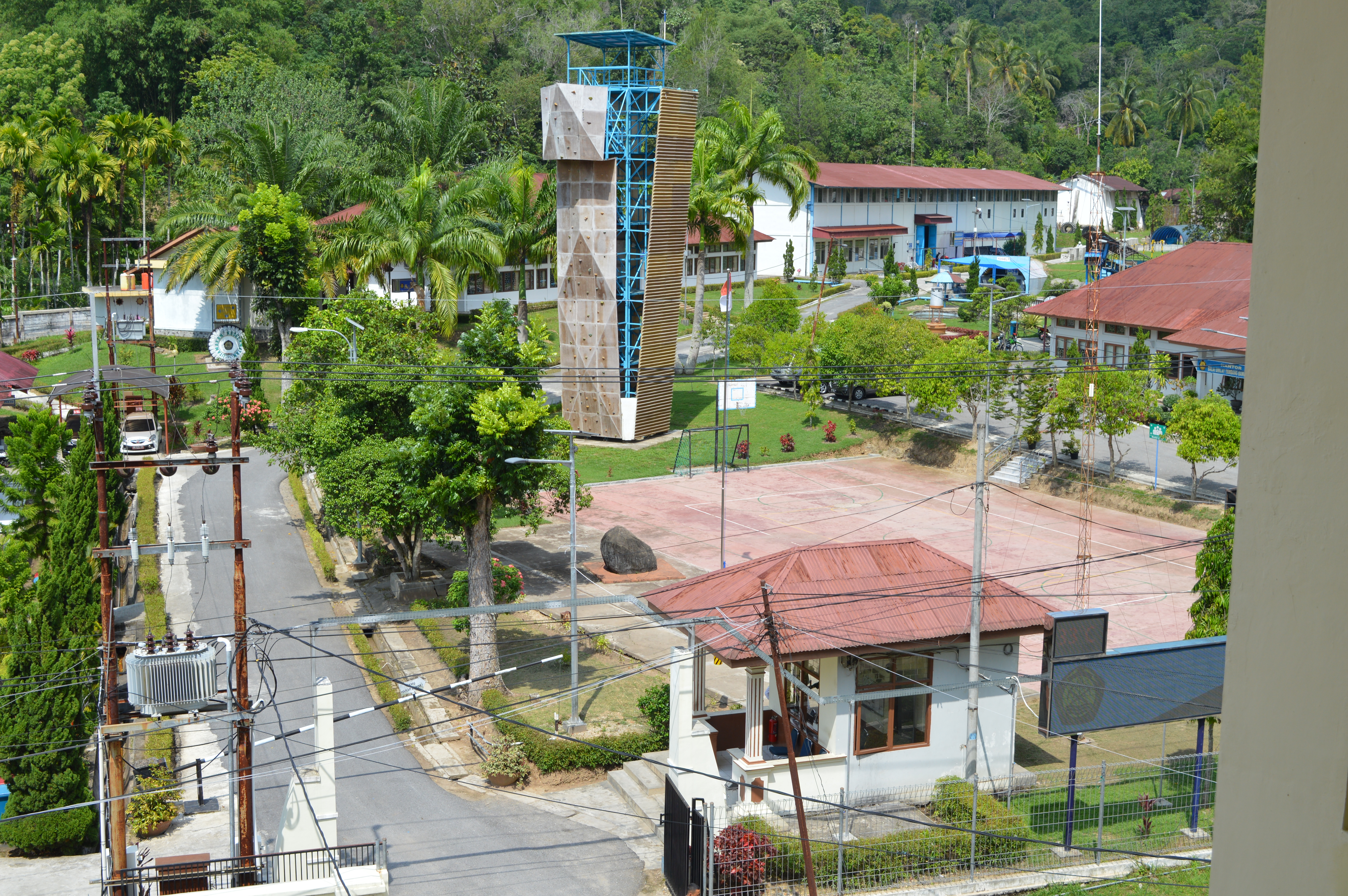 Balai Diklat Tambang Bawah Tanah